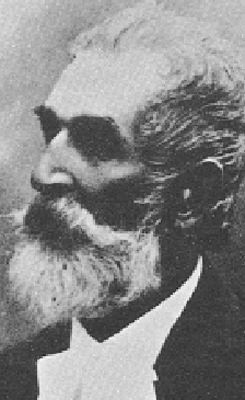 Carlo Podrecca (1839-1916)